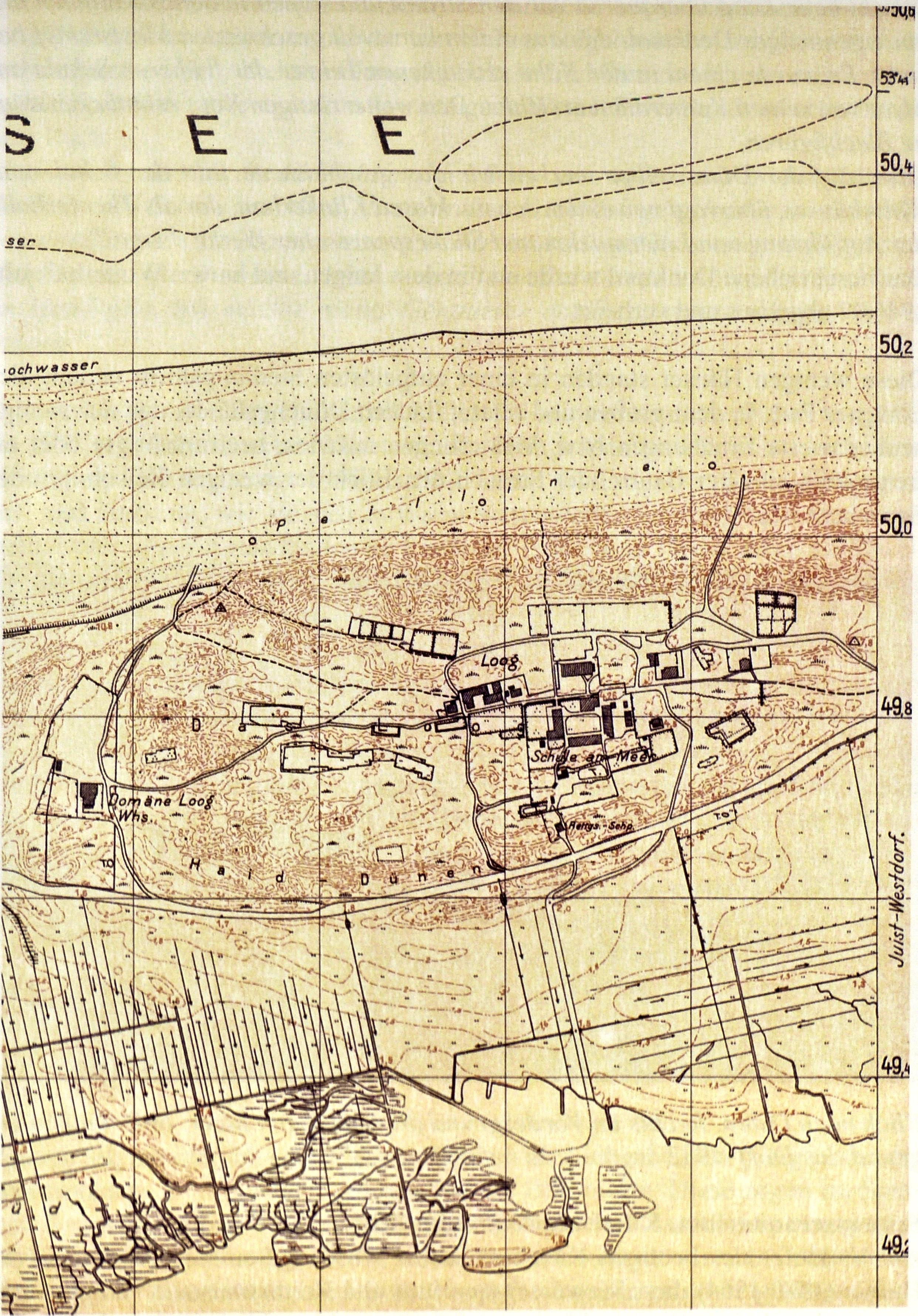 Loog auf Juist mit Schule am Meer. Auf diesem Kataster-Auszug erkennt man die spärliche Bebauung des Loog zu Beginn der 1930er Jahre. Es dominieren zu dieser Zeit die Gebäude des reformpädagogischen Landerziehungsheims Schule am Meer, deren neu errichtete freistehende Theaterhalle 1929 geplant und 1930/31 errichtet worden war. Südlich davon stehen das Hauptgebäude Diesseits, die Arche, die Westfalenhalle, das Jenseits sowie das Mädchenhaus Gaurisankar, der Olymp und das Bootshaus für die Segeljollen des Internats (im Plan als Rettgs.-Schp. = Rettungsschuppen bezeichnet). Westlich der Theaterhalle steht das Ensemble aus do, re und mi, das heute teils das Küstenmuseum Juist beherbergt. Weiter östlich steht das Neufundland, in dem die jüngsten Schüler (ab 10 Jahren) untergebracht waren. Die Arche, die ehemalige Bühnenhalle (beide DJH), do, re, mi (Gemeindebesitz; re und mi bilden das heutige Küstenmuseum Juist) und Neufundland (Privatbesitz) sind bis heute erhalten, allerdings teils umgebaut.